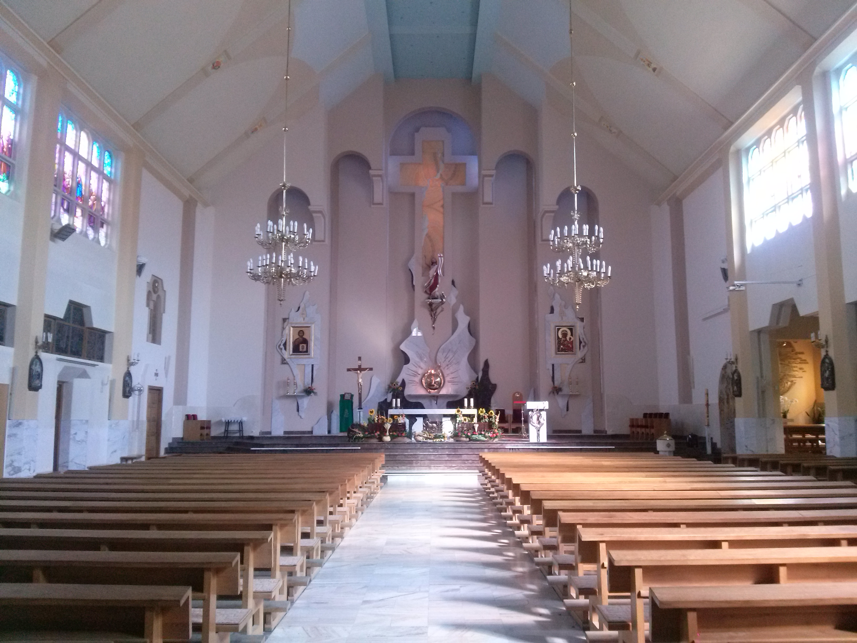 Wnętrze kościoła św. Judy Tadeusza w Rzeszowie